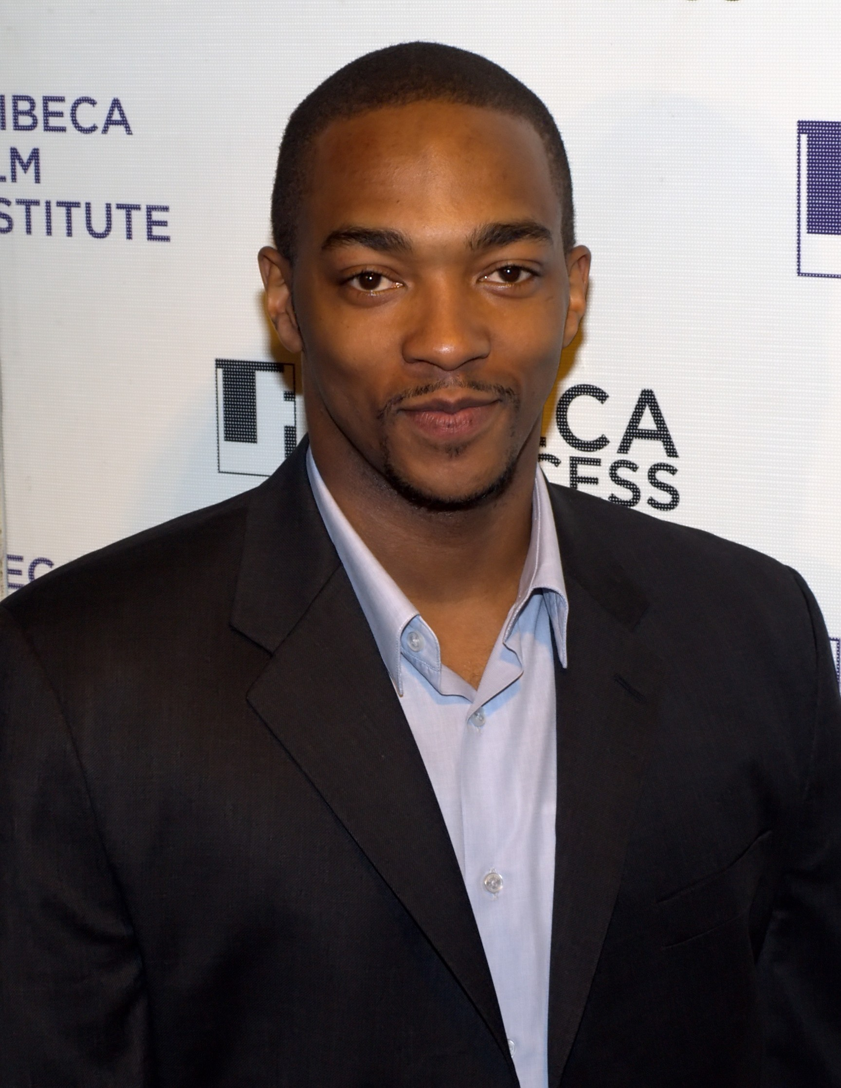 Anthony Mackie at Tribeca Film Festival 2010